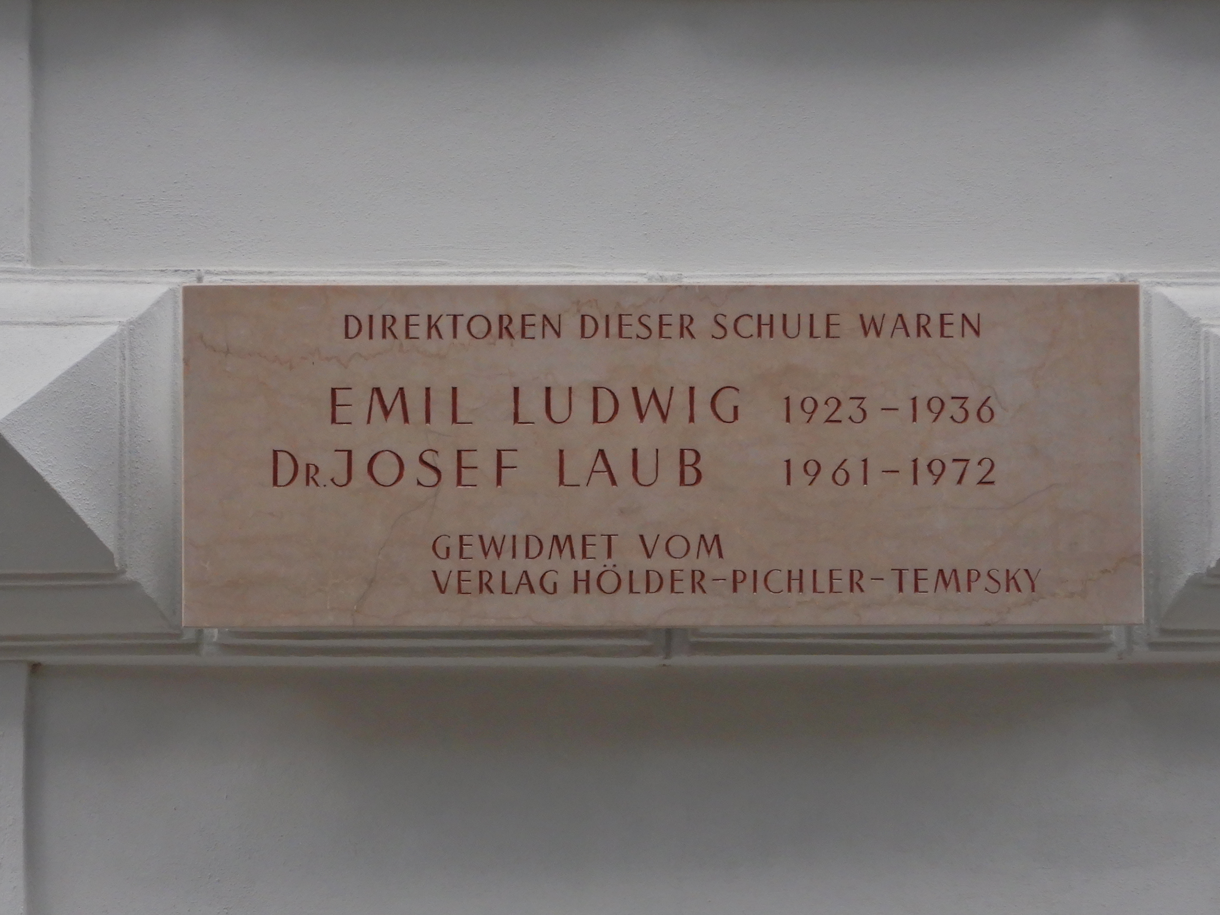 Gedenktafel für Direktor Emil Ludwig (Wien, Schottenbastei 7 - 9)